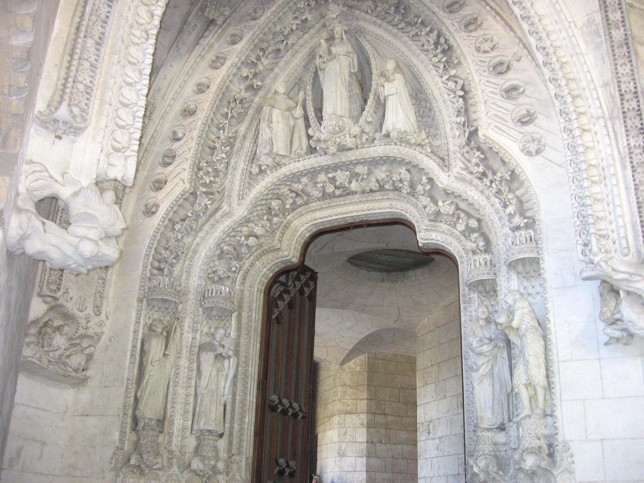 Claustro del Rosario, Sagrada Familia (Barcelona).